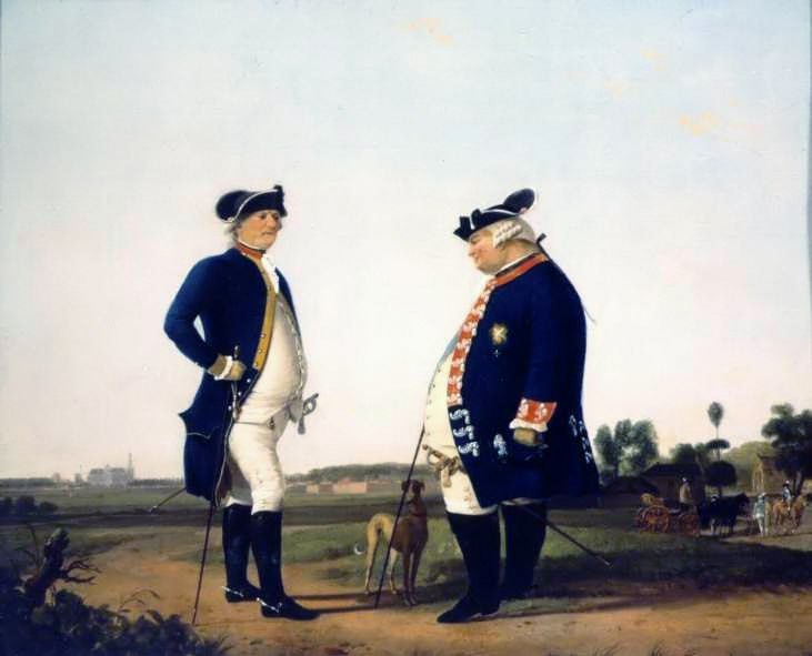 De hertog van Brunswijk (rechts) en zijn plaatsvervanger en opvolger Robert Douglas, in 1786 geschilderd door Jacobus Vrijmoet (1756-?) (met dank aan het Noordbrabants Museum) Ludwig von Brunswick (right), and his replacement Robert Douglas, painted in 1786 by Jacobus Vrijmoet (1756-?) (with thanks to the Noordbrabants Museum)